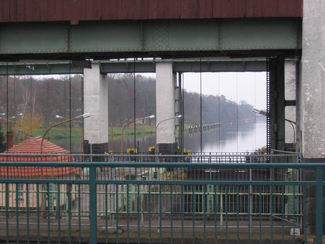 Teltowkanal Brandenburg, Schleuse Kleinmachnow, Bild 2